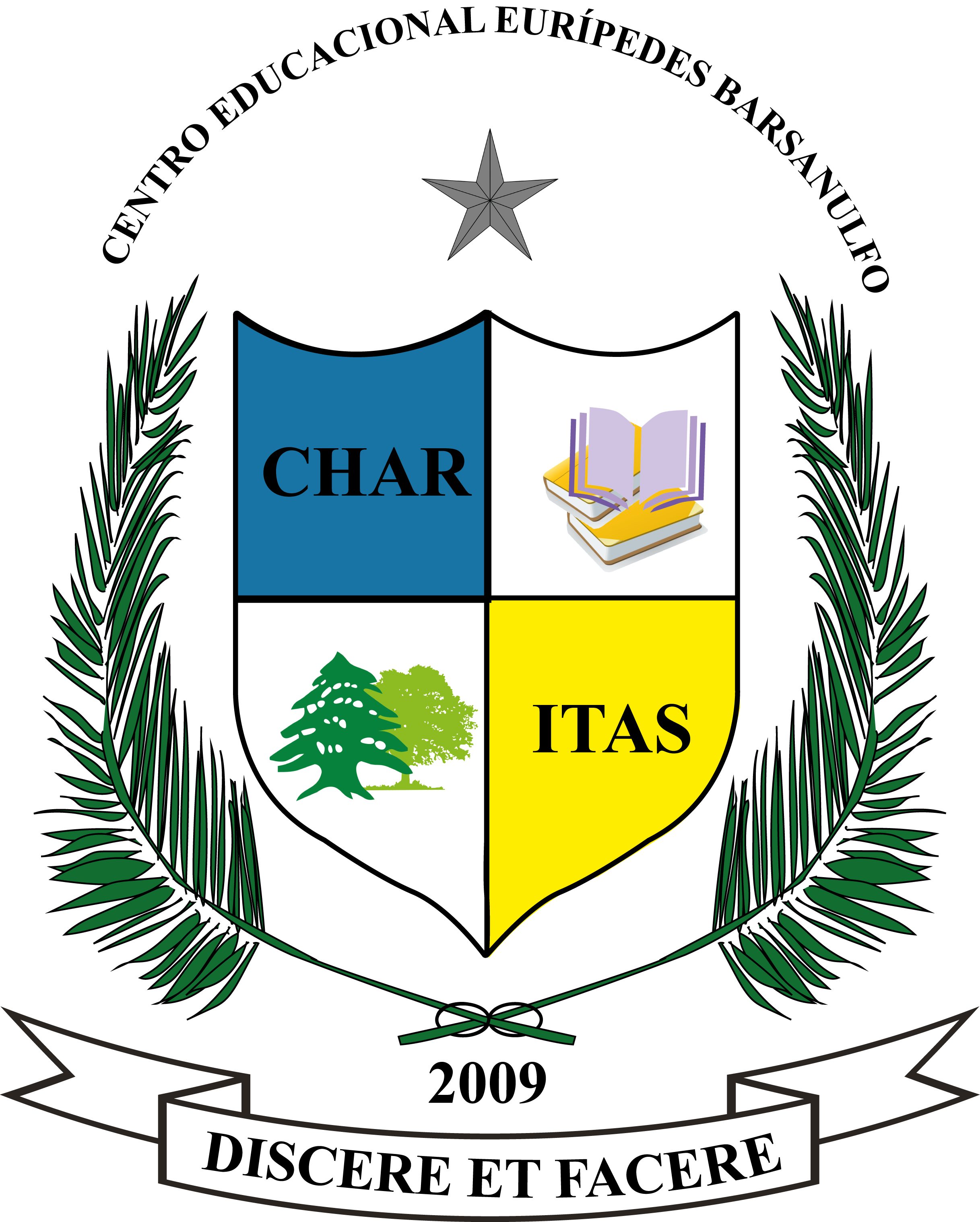 Brasão do Centro Educacional Eurípedes Barsanulfo, escola de Santa Inês, Maranhão, Brasil